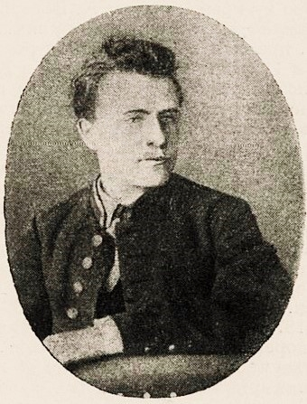 Rodislav Andreevič Steblin Kamenskij